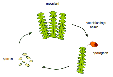 Eigen productie